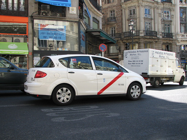 un Seat Toledo :O ! jaja